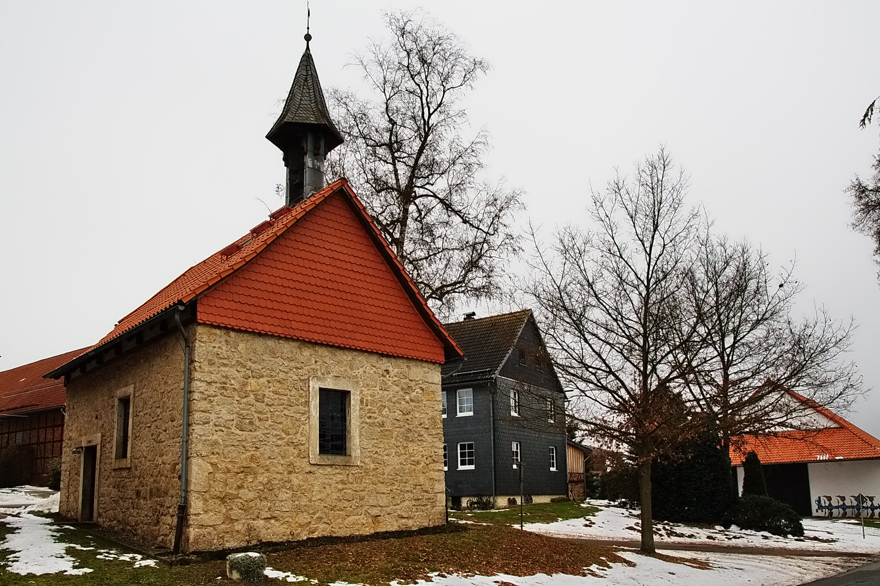 Kapelle in Hallensen (Einbeck), Niedersachsen, Deutschland